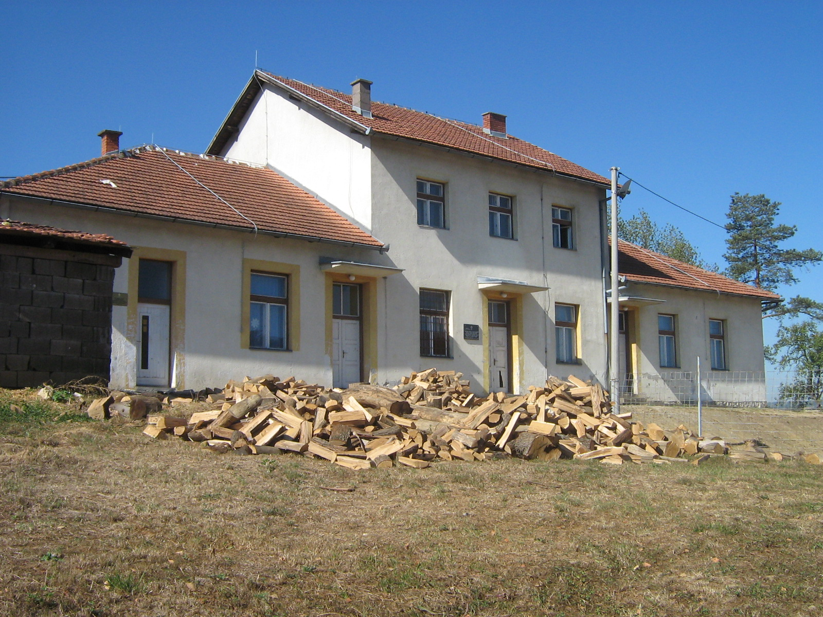 Основна школа Свети Сава у Липцу, четворогодишња. Нешковић Дејан